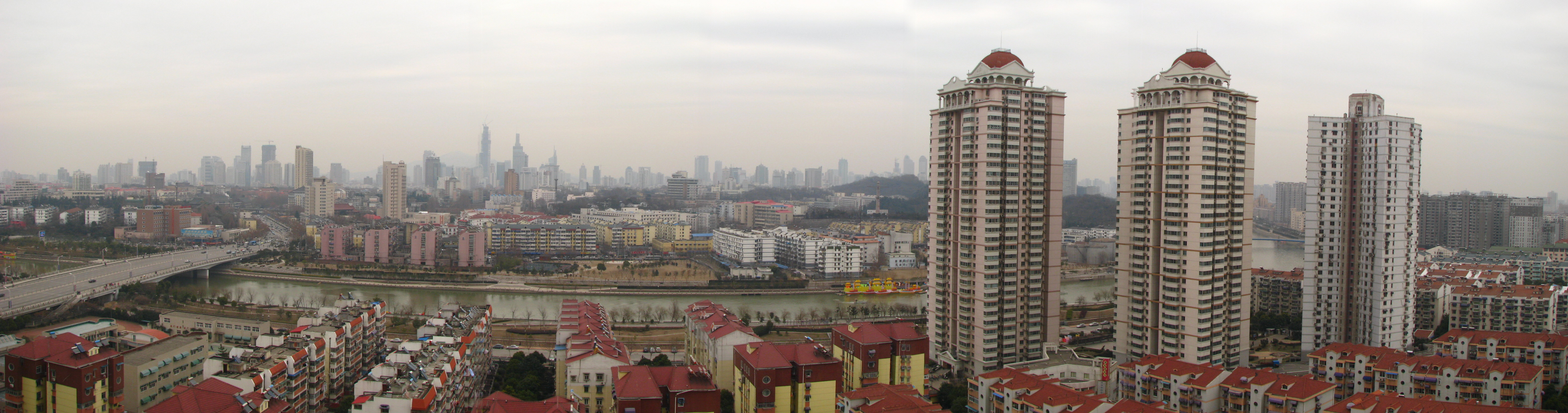 A Panorama of Nanjing